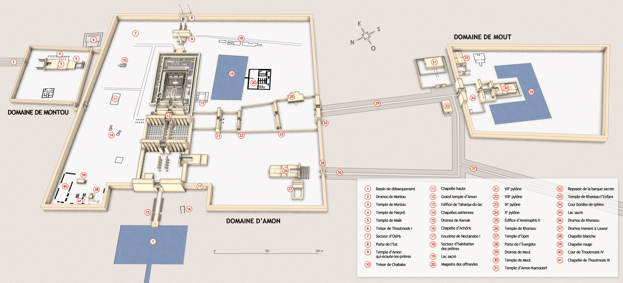 Plan 3D du site de Karnak, avec le domaine de Montou, le domaine d'Amon et le domaine de Mout.